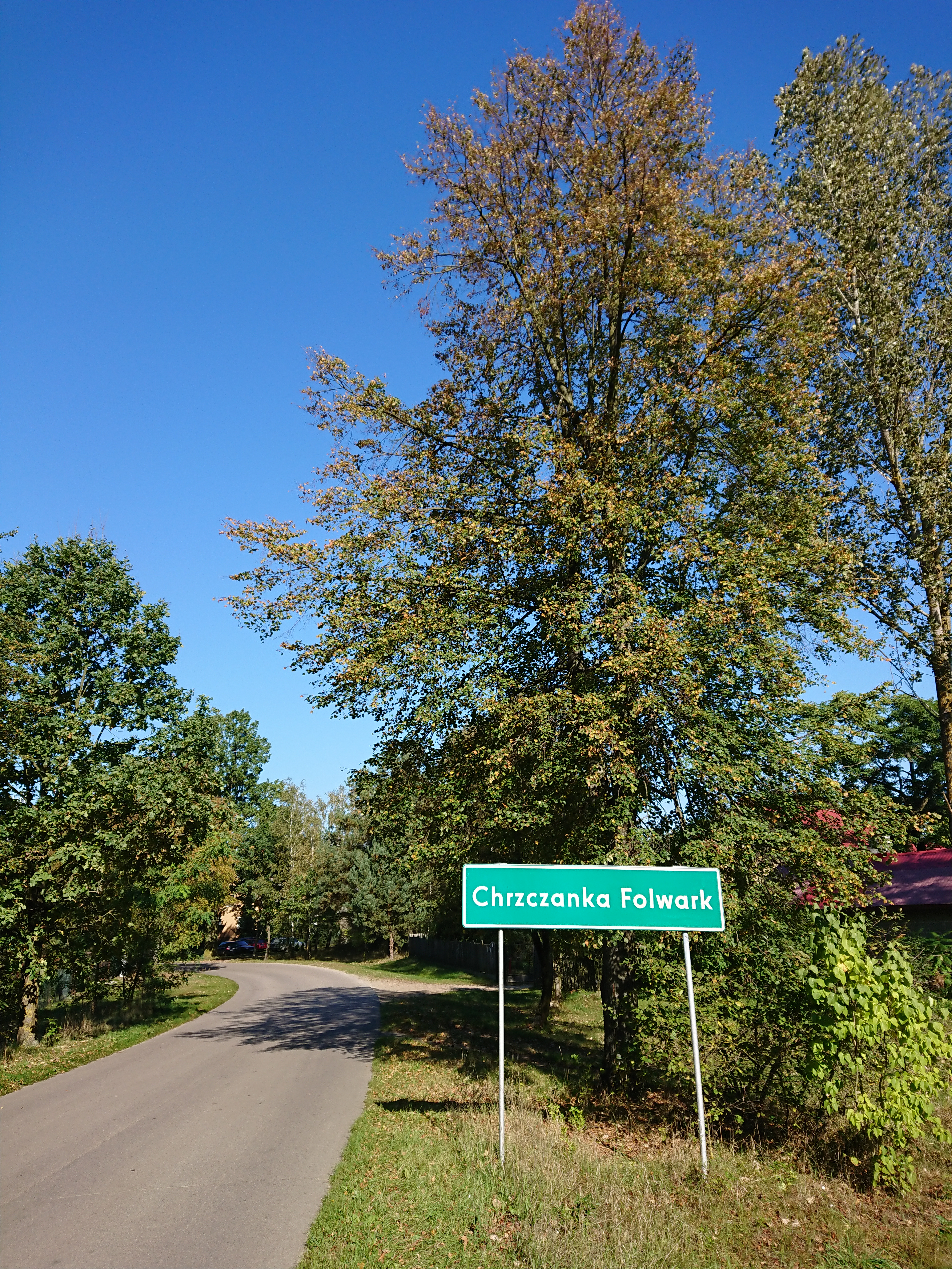 Wjazd do Chrzczanki-Folwarku